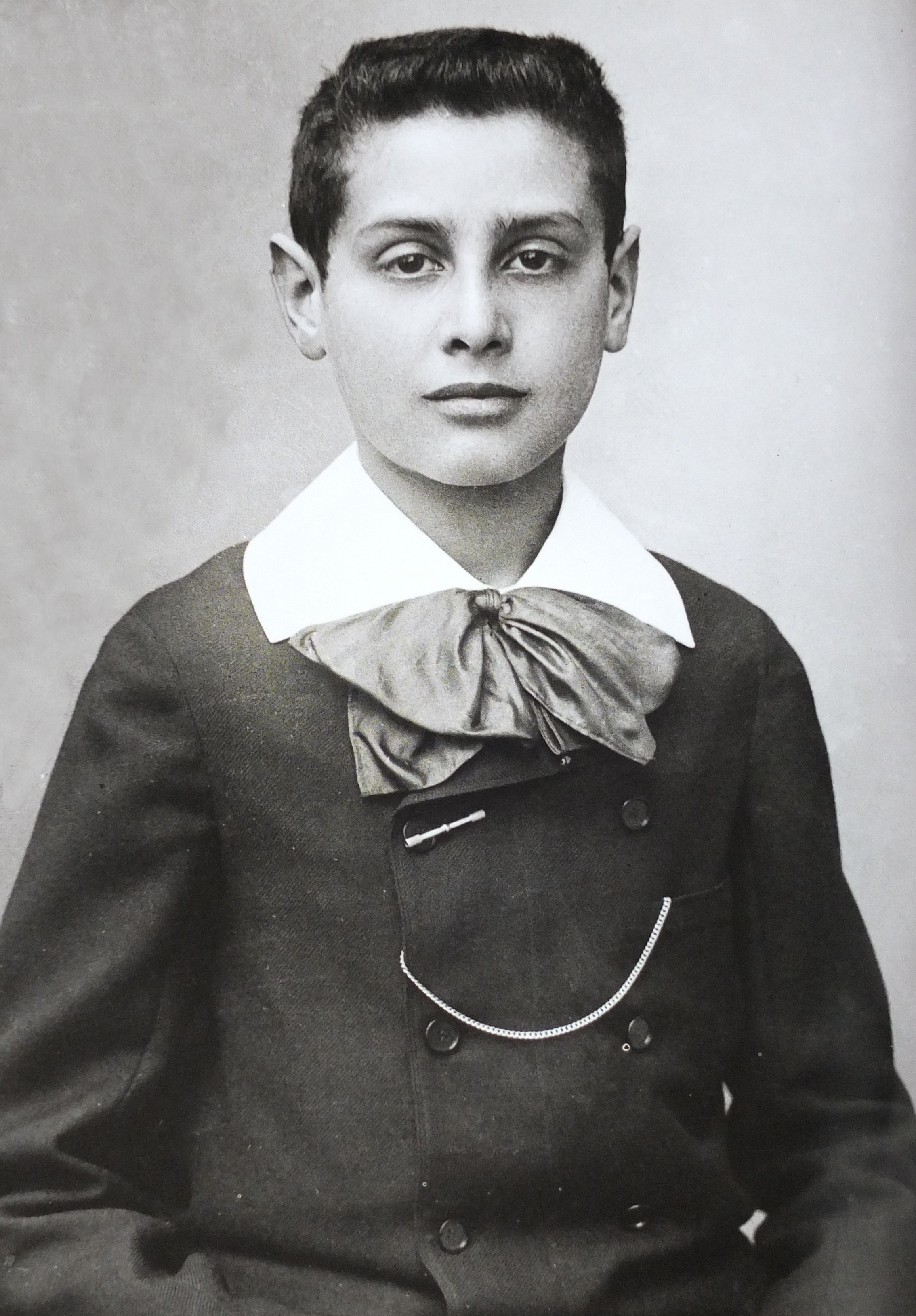 Robert Proust (presque 14 ans), photographié le 24 mars par Paul Nadar.